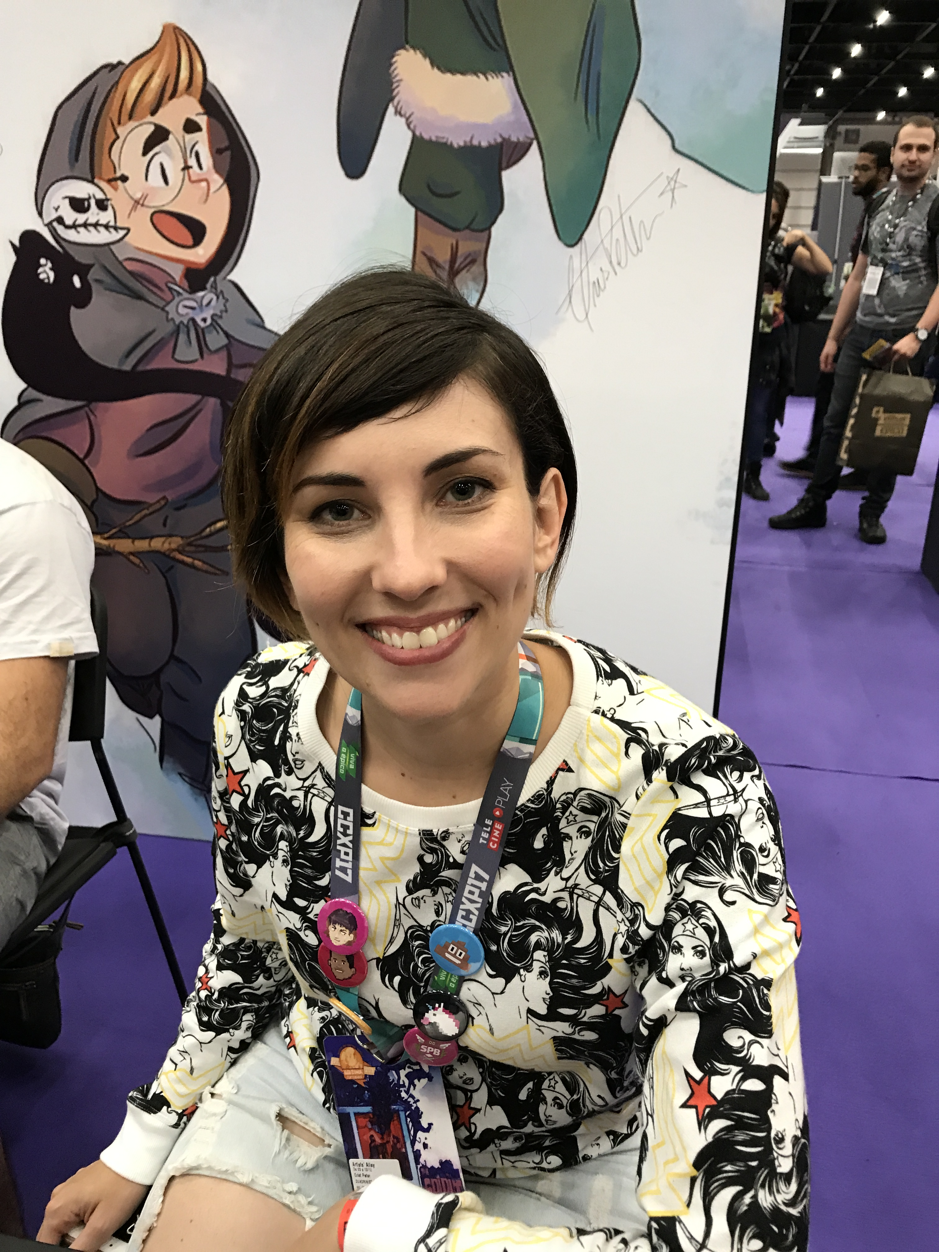 Artista Cris Peter na edição de 2017 da Comic Con Experience